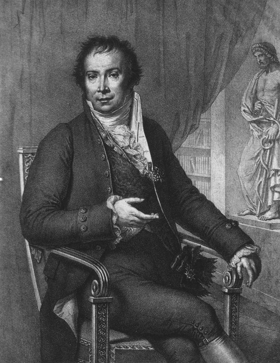 Baron Jean-Louis Alibert